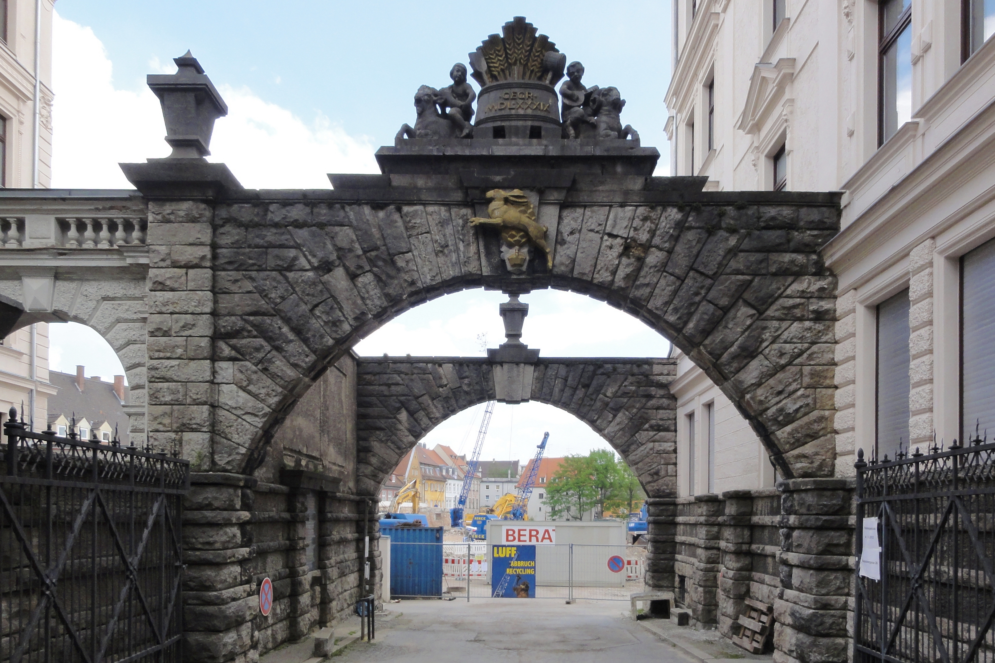 Zufahrt zum ehem. Hasen-Bräu-Fabrikgelände in Augsburg